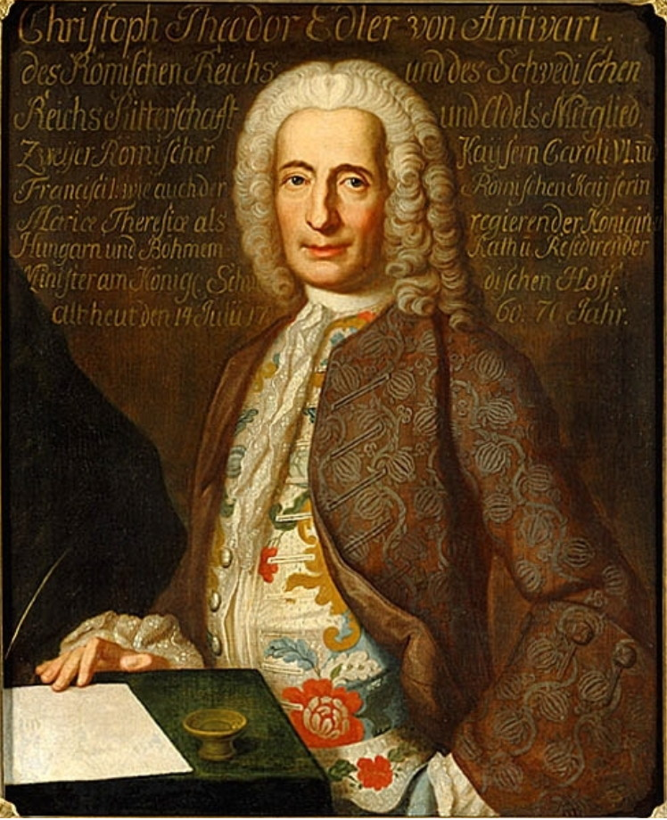 Christoph Theodor Antivari, 1690-1763, österrikisk diplomat, kejserlig resident.